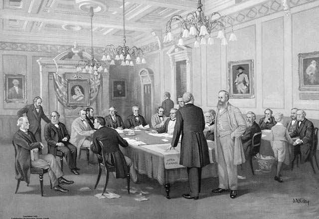 Les Pères de la Confédération à la Conférence de Londres, 1866. © Rogers Cantel. Reproduction autorisée par Rogers Communications Inc. Source : Bibliothèque et Archives Canada/C-006799